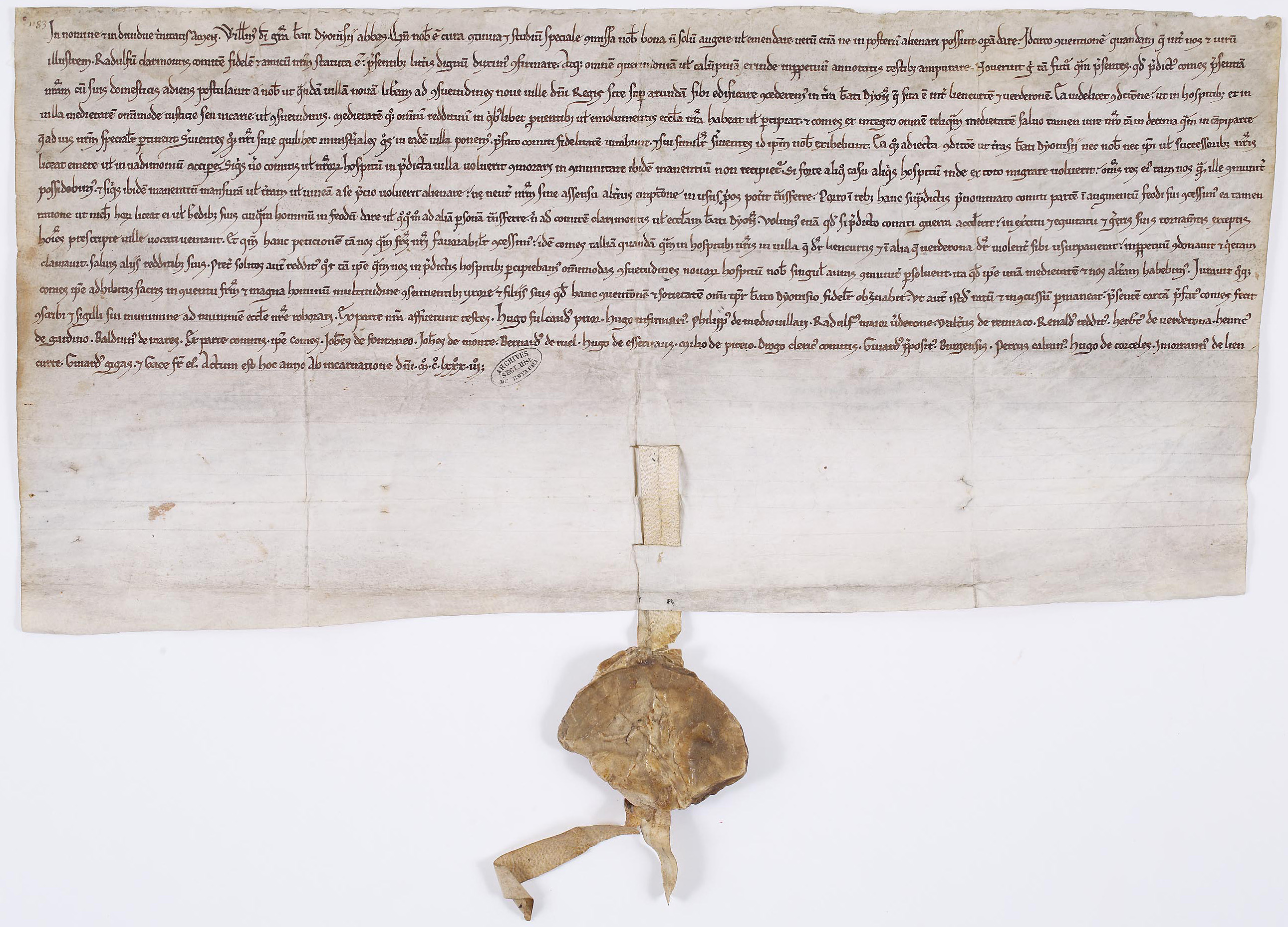 Fondation d’un village par Raoul, comte de Clermont, et l’abbé de Saint-Denis. Saint-Denis, 1183.